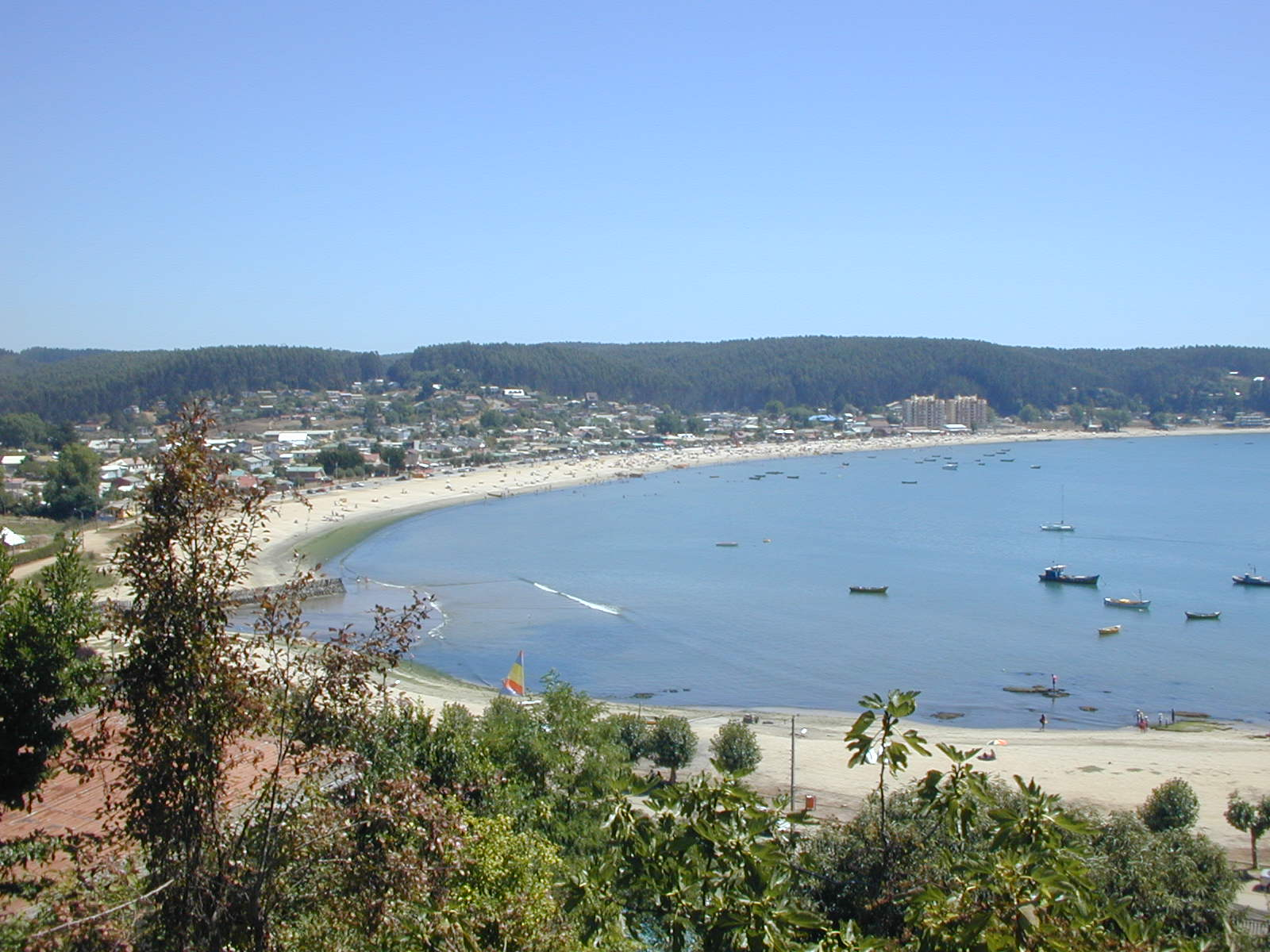 Dichato